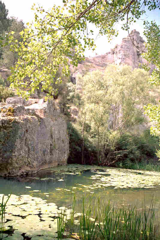 Nenúfares en el Cañón del río Lobos Tomada por --JMSE el 3 de julio de 2003 y cedida a Wikipedia.